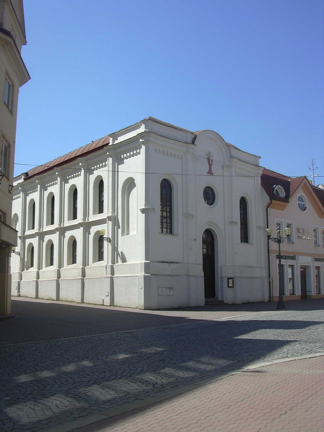 Vyškov, kostel Církve československé husitské, bývalá synagoga